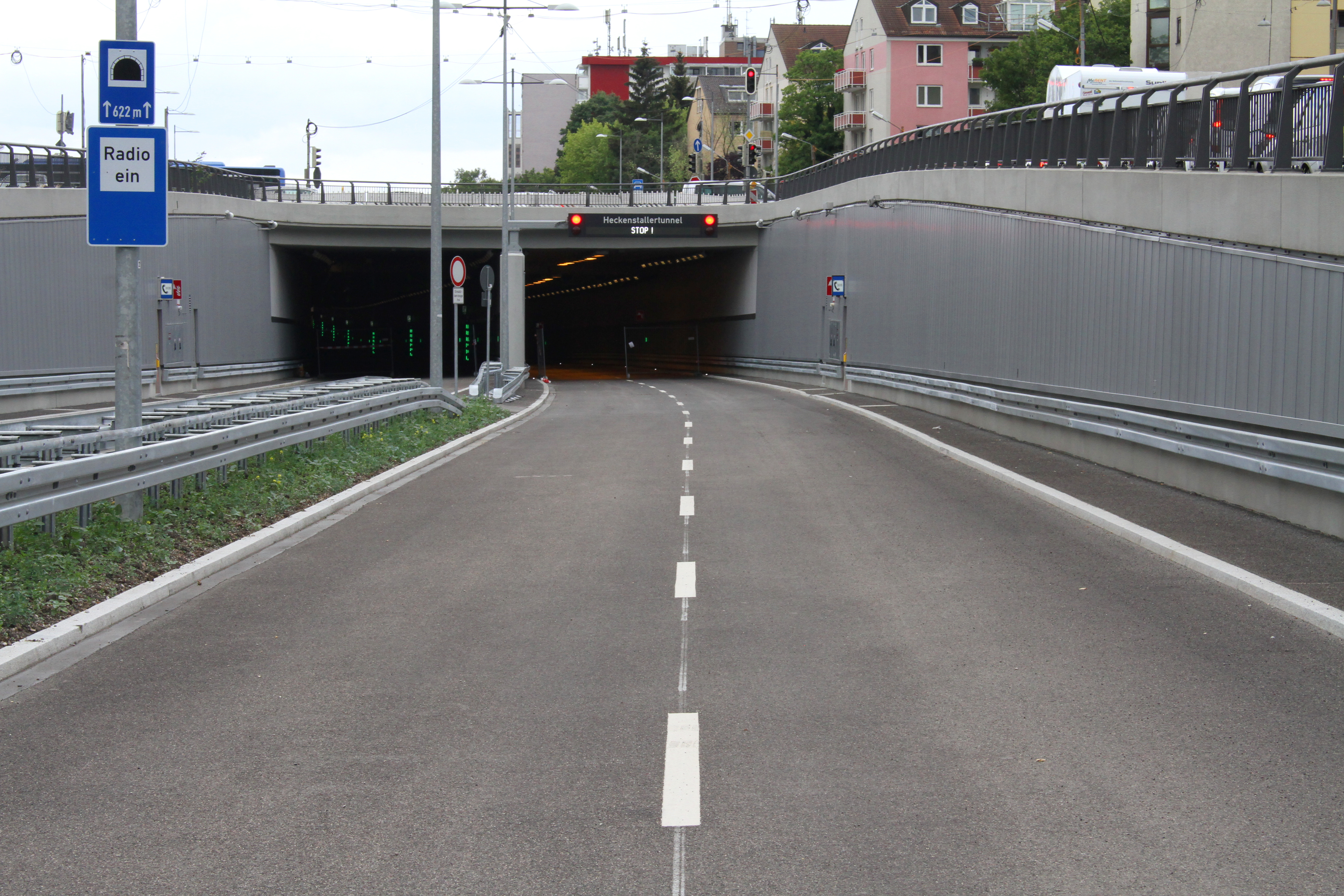 Heckenstaller-Tunnel des Mittleren Rings, Ost-Portal